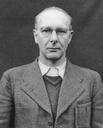 Portrait of Viktor Brack as a defendant in the Medical Case Trial at Nuremberg. [Photograph ##07333], Porträt von Viktor Brack als Angeklagter im Nürnberger Ärzteprozess. [Fotografie#07333]